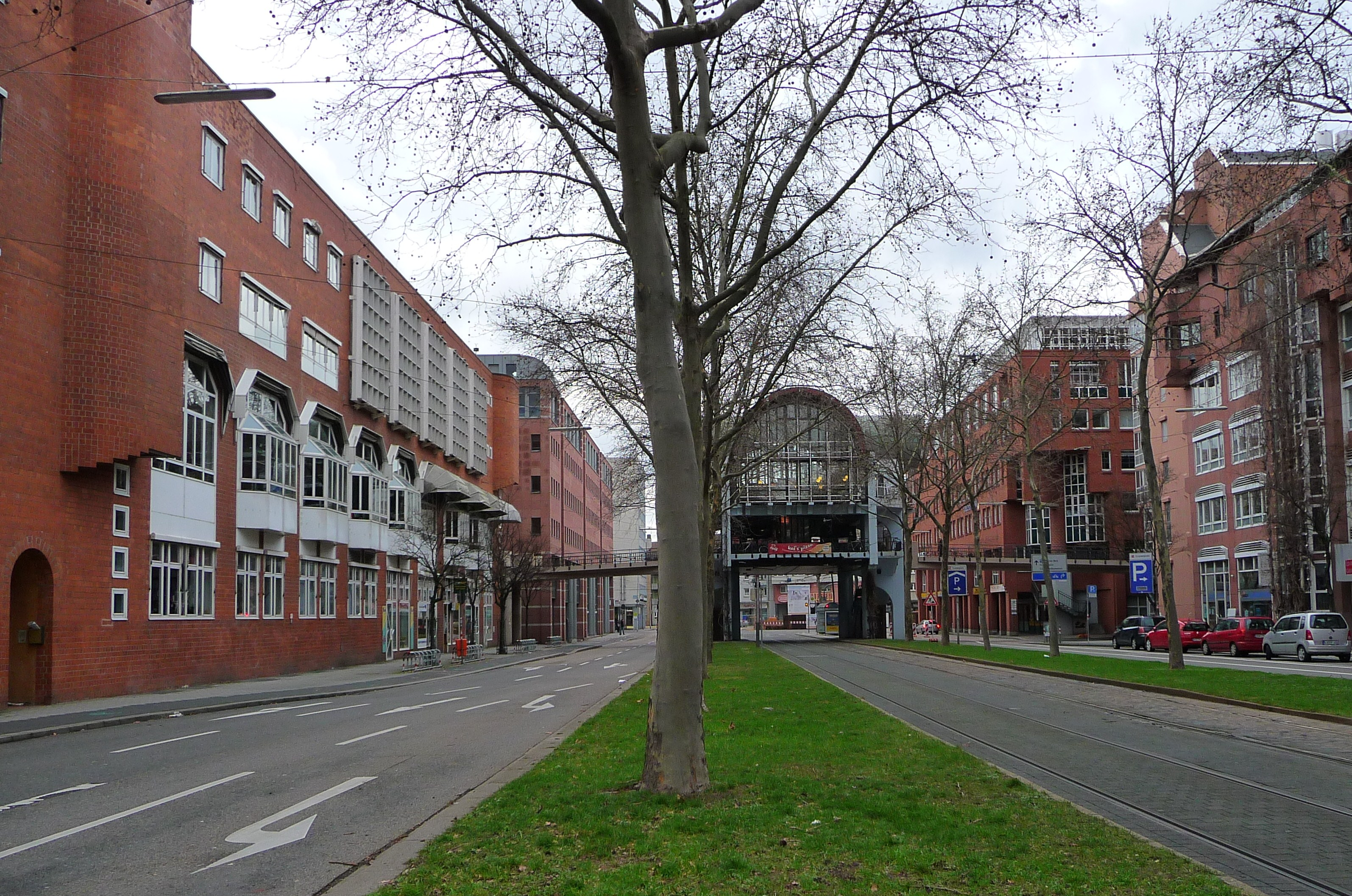 Fritz-Erler-Straße in Karlsruhe (Baden-Württemberg, Deutschland)